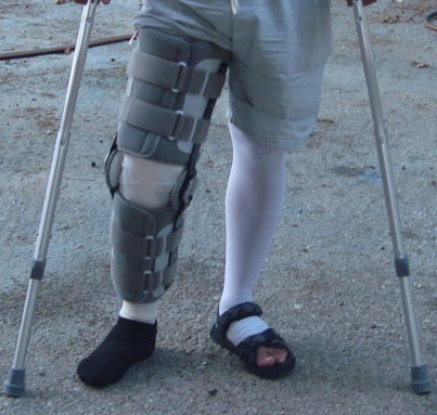 Ασθενής 2 ημέρες μετά από εγχείρηση μηνίσκου